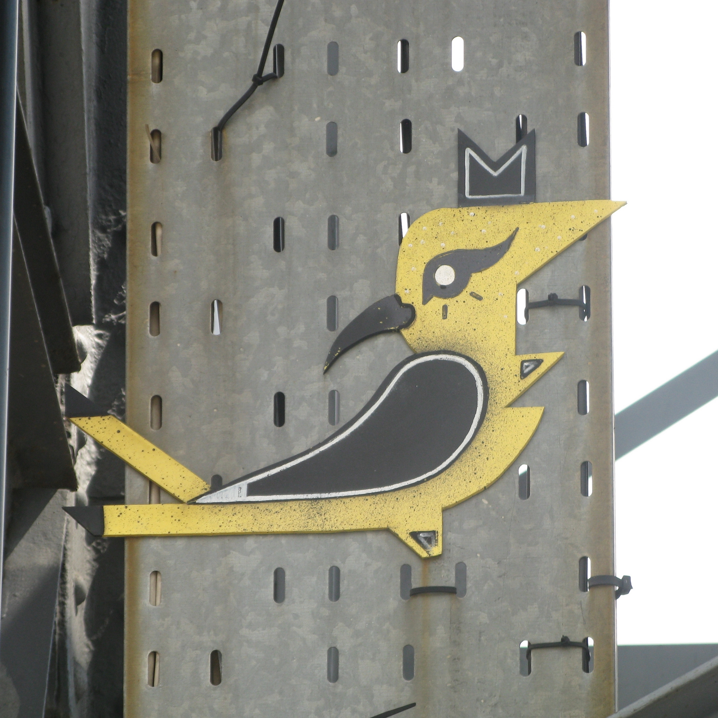 Gwarki 2.0, praca Jana Michała Raspazjana, jeden z ptaków na wieży wyciągowej szybu Warszawa II Kopalni Węgla Kamiennego Katowice, obecnie teren Muzeum Śląskiego w Katowicach.